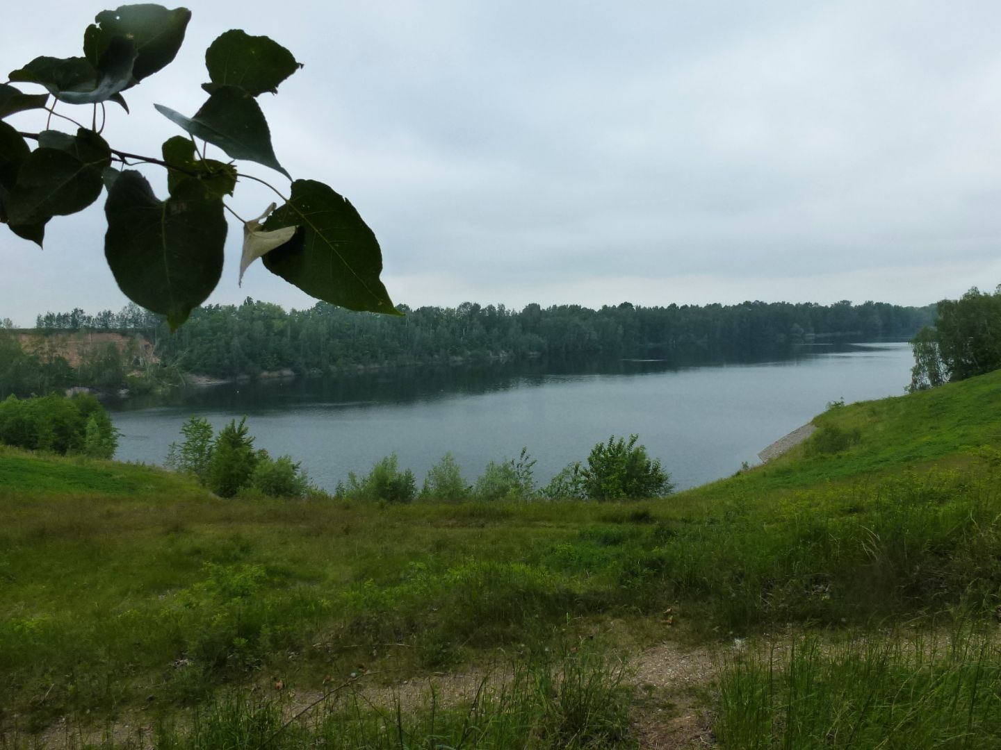 See bei Penkwitz